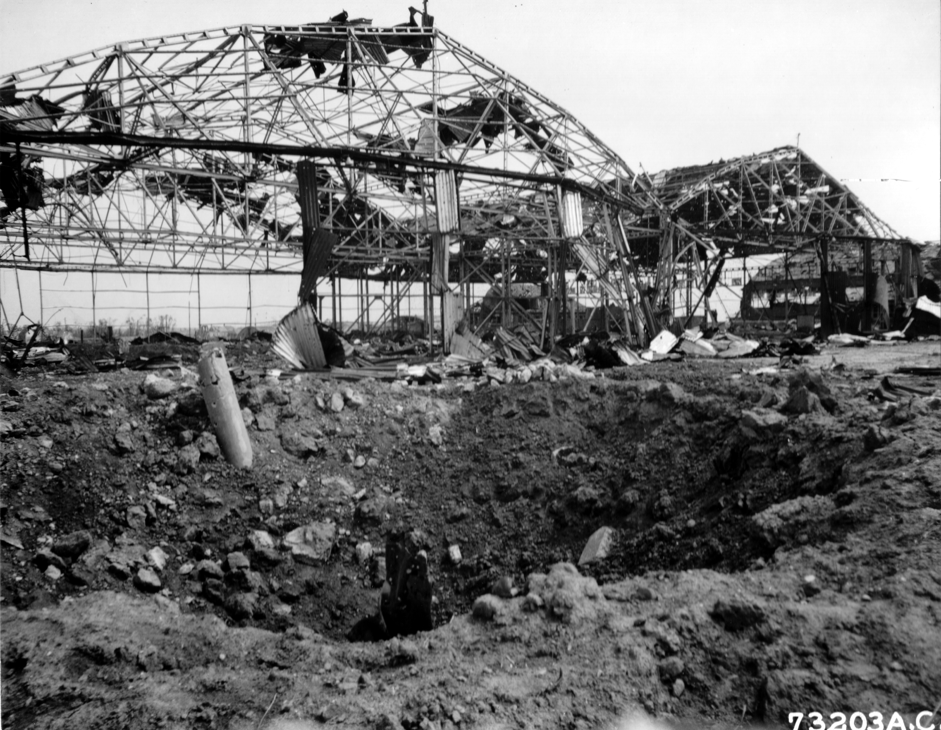 Un trou d'obus au premier plan. Ruines des hangars de l'aérodrome de Carpiquet totalement détruits par le bombardement.